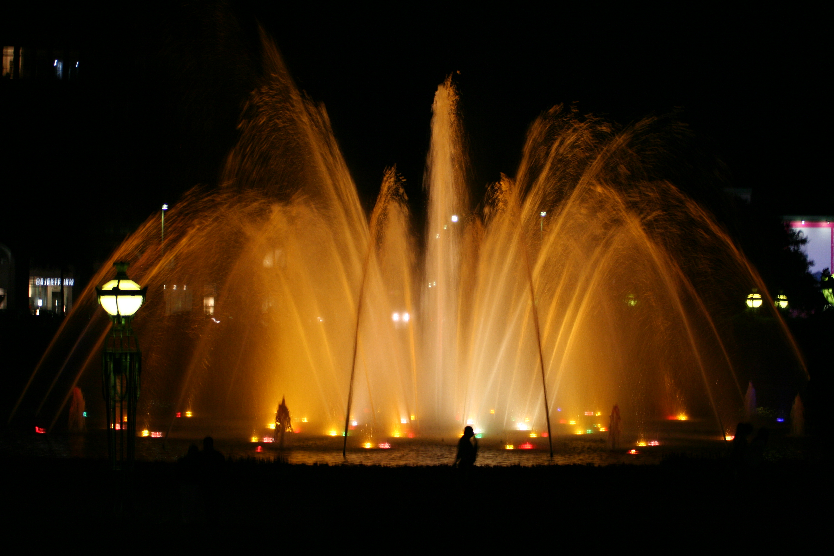 Wasserspiele am Mannheimer Wasserturm - Nr. 001 Fountain the water tower in Mannheim - No. 001